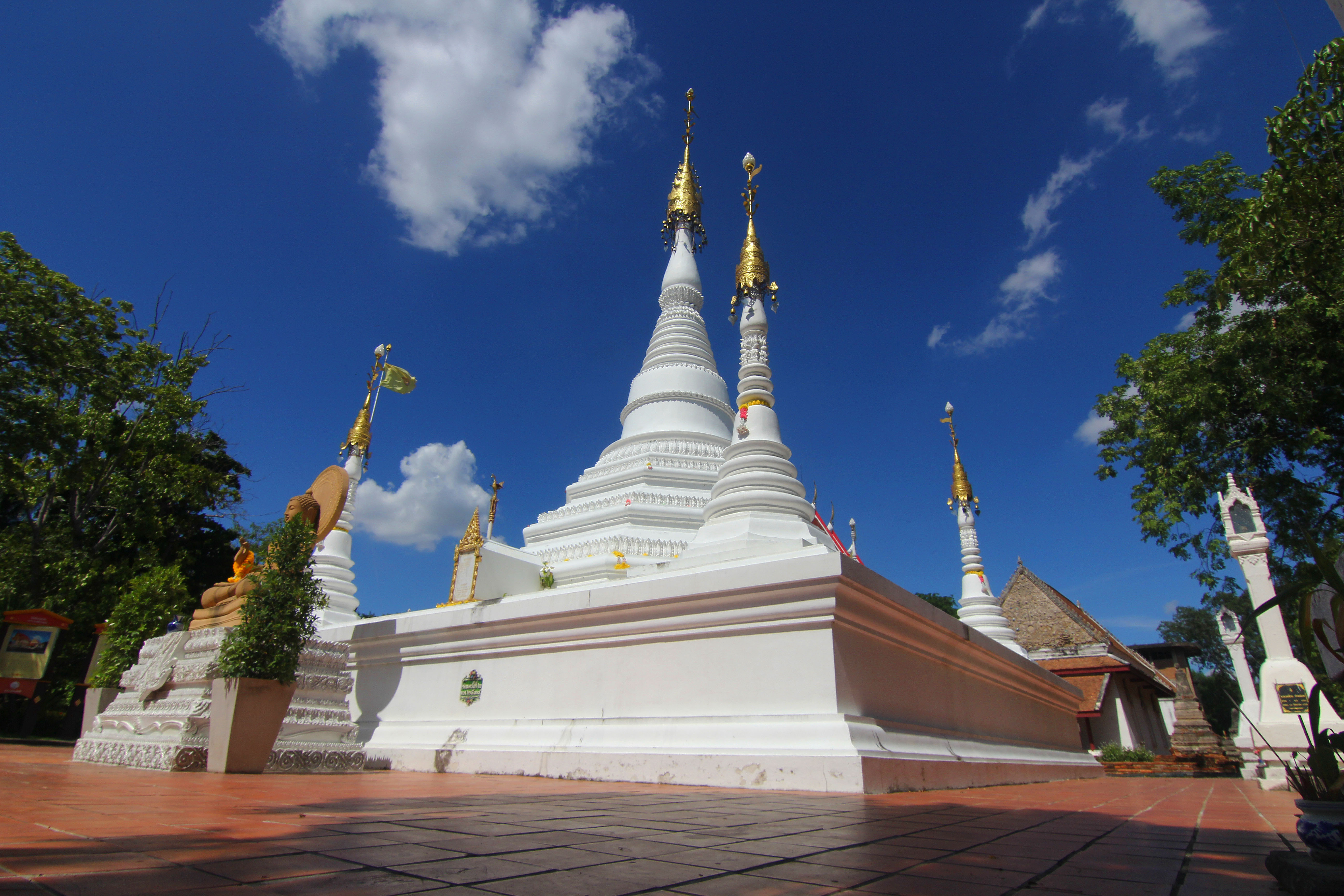 วัดเก่าในจังหวัด นนทบุรี